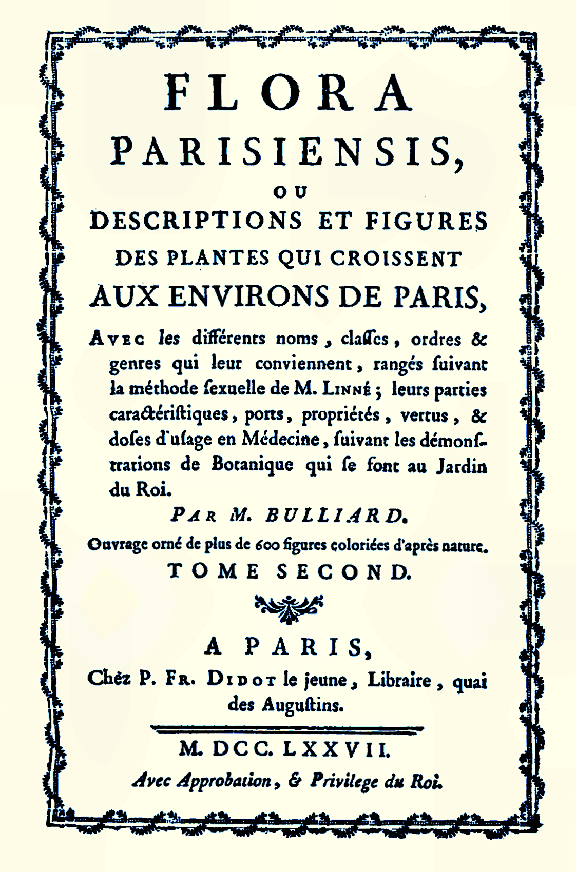 Bulliard, Flora Parisiensis ou descriptions et figures des plantes qui croissent aux environs de Paris, vol. 2